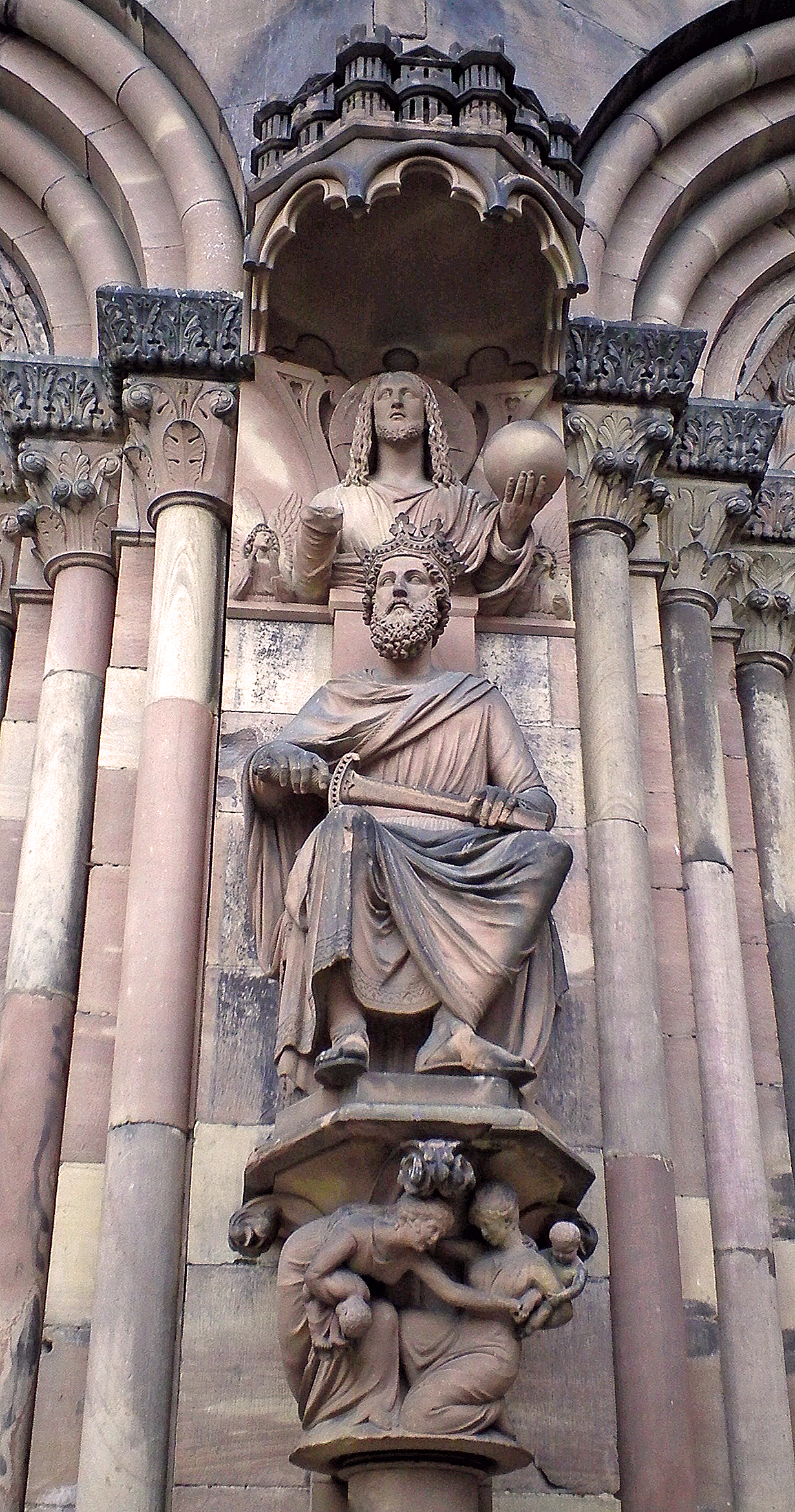 Strasbourg, portail du jugement dernier (portail Sud) sculptures du roi Salomon et du Christ en majesté par Jean Vallastre